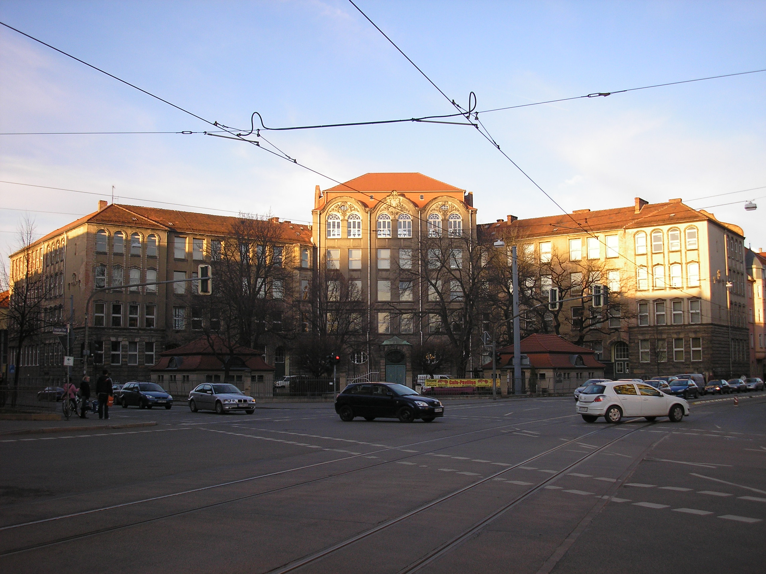 Die Medizinische Fachschule am Leipziger Platz in Erfurt.